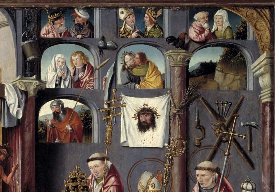 Paus Gregorius knielt voor het altaar. Christus staat in een sarcofaag achter het altaar. Het bloed uit zijn zijdewond stroomt in de kelk op de altaartafel en besprenkelt ook het naaktfiguurtje in het vagevuur naast het altaar. Tegen de achterwand en op de tafel zijn passiewerktuigen afgebeeld en figuren die bij Christus’ lijden betrokken waren. Rechts bevinden zich de drie andere westerse kerkvaders, evenals Gregorius voorzien van een aureool: Ambrosius met staf en geselroede, Hieronymus met leeuw, Augustinus met in zijn handen een hart. Op de voorgrond links de stichter.